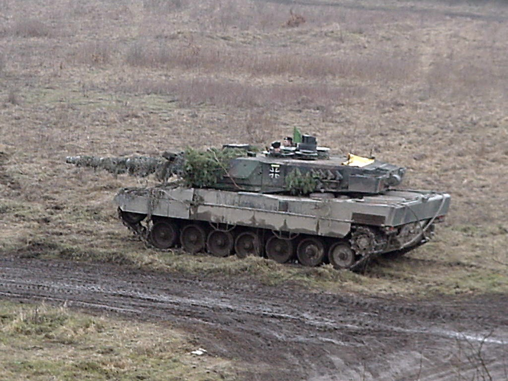 Leopard w czasie ćwiczeń Bundeswehry na poligonie Orzysz